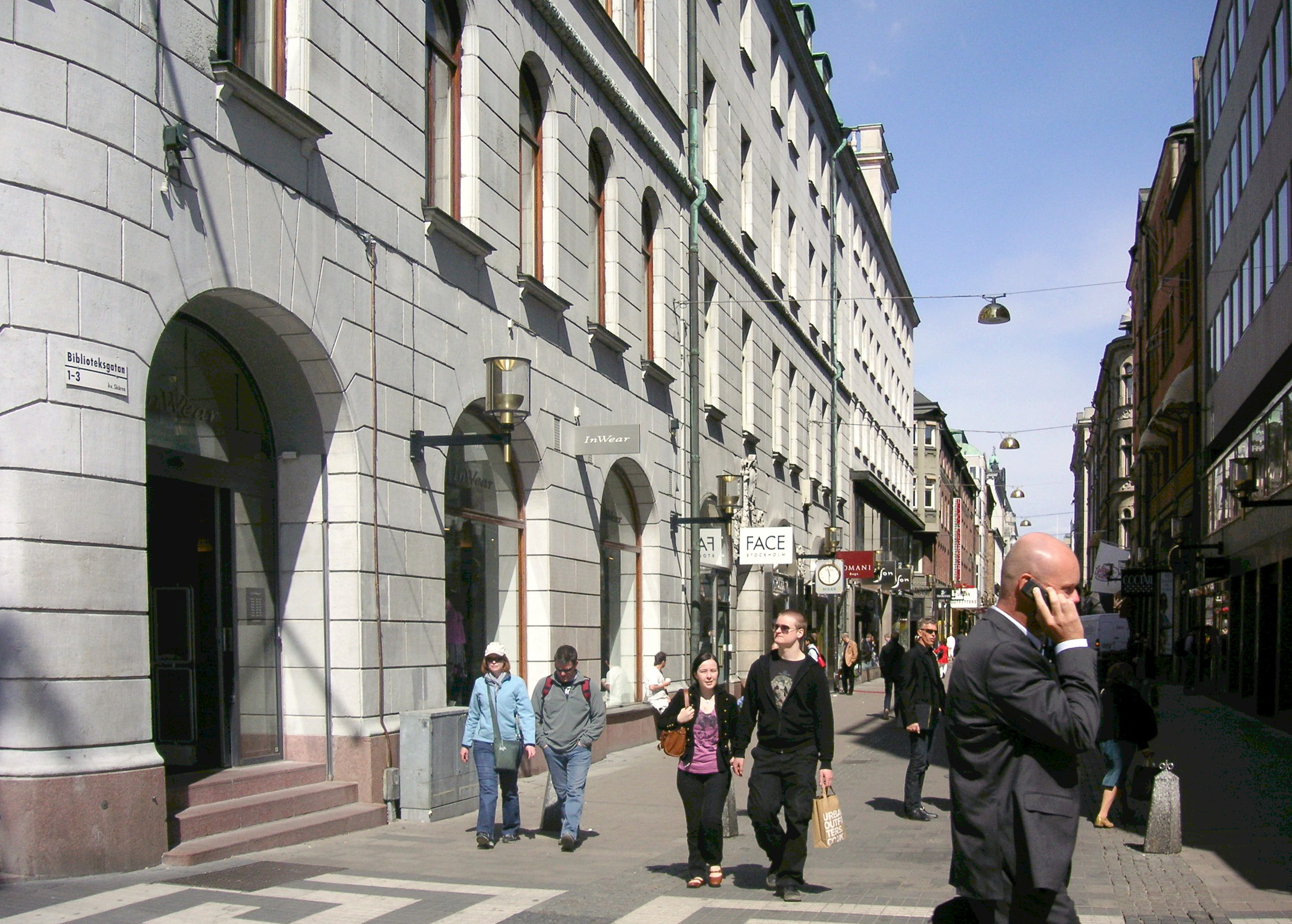 Biblioteksgatan in Stockholm